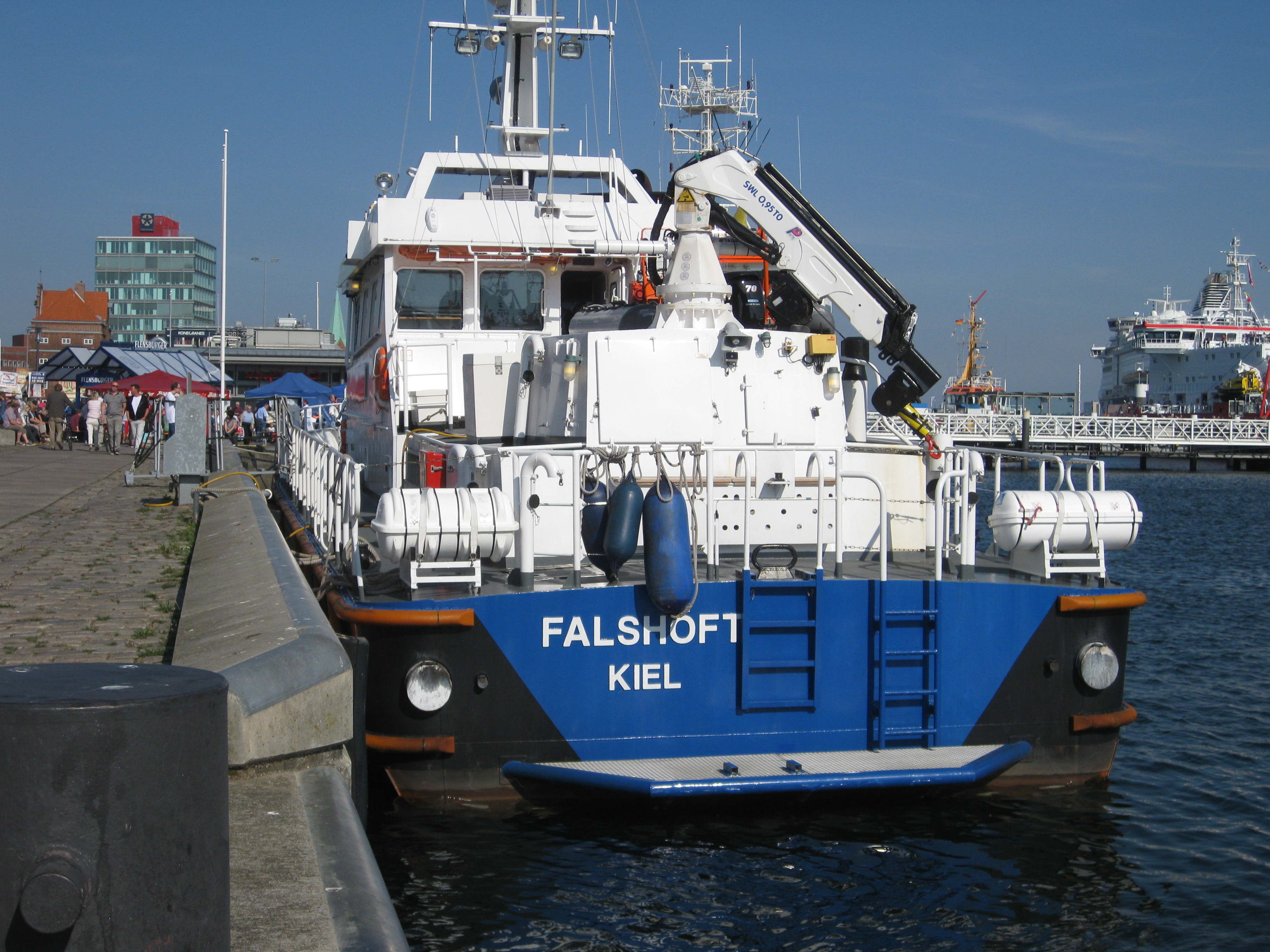 Küstenboot "Falshöft" WSP SH